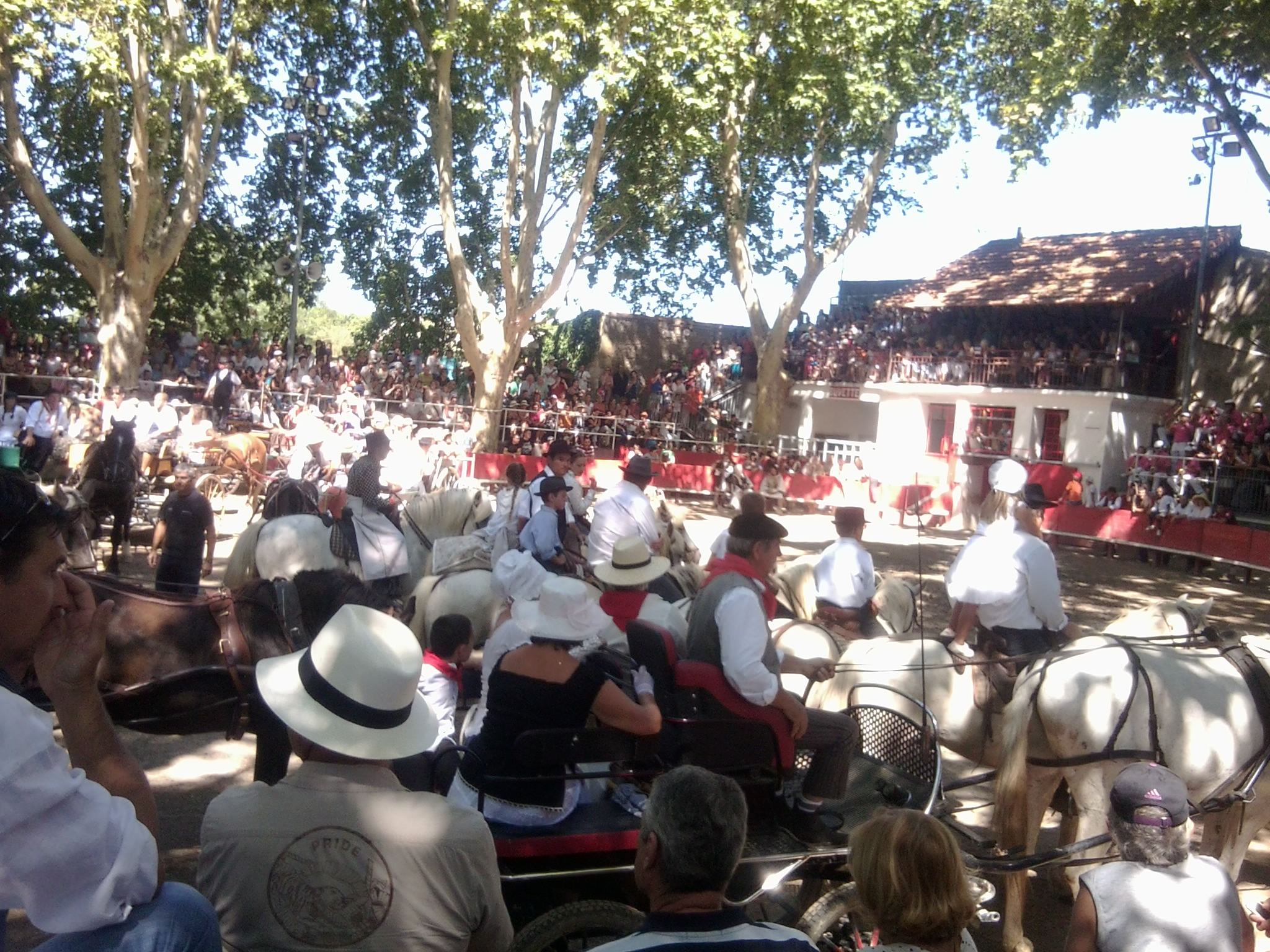 Les arènes du Cailar en août, pendant la fête votive.